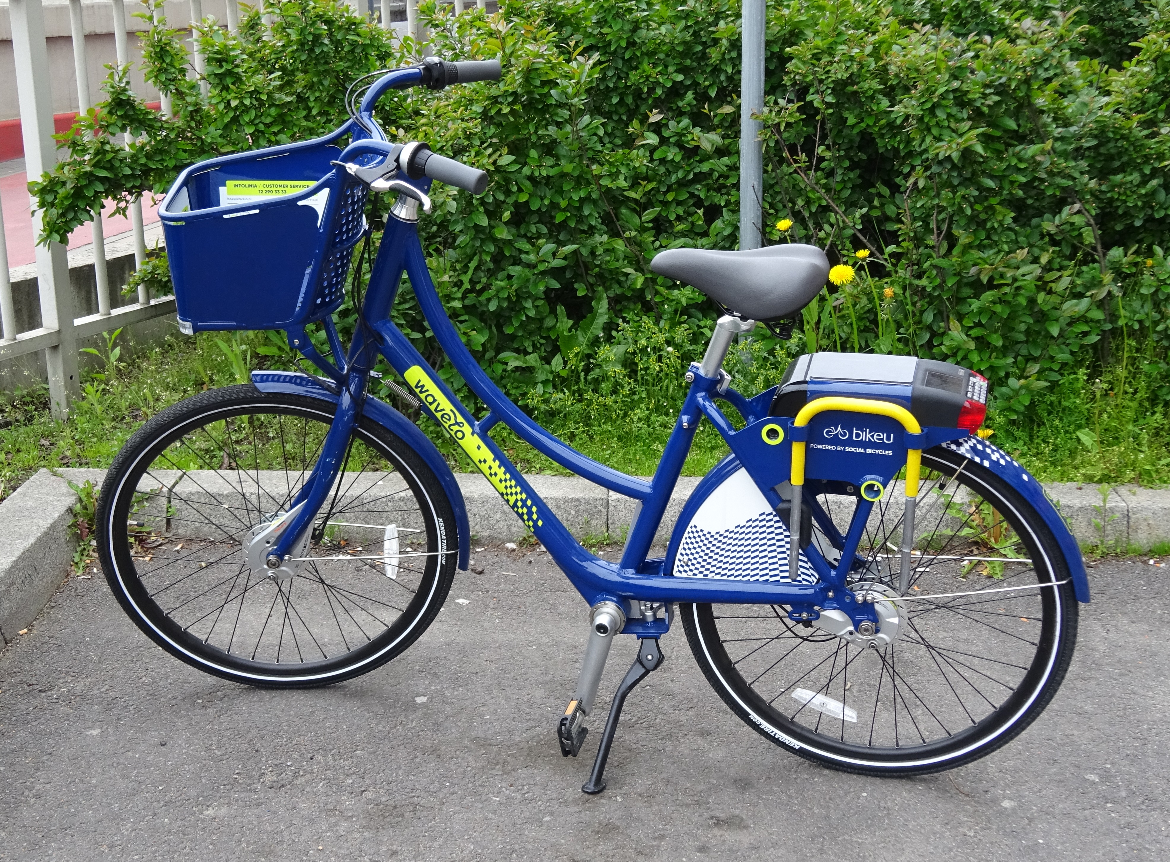 Rower z systemu miejskiej wypożyczalni rowerów „Wavelo” w Krakowie. 2017